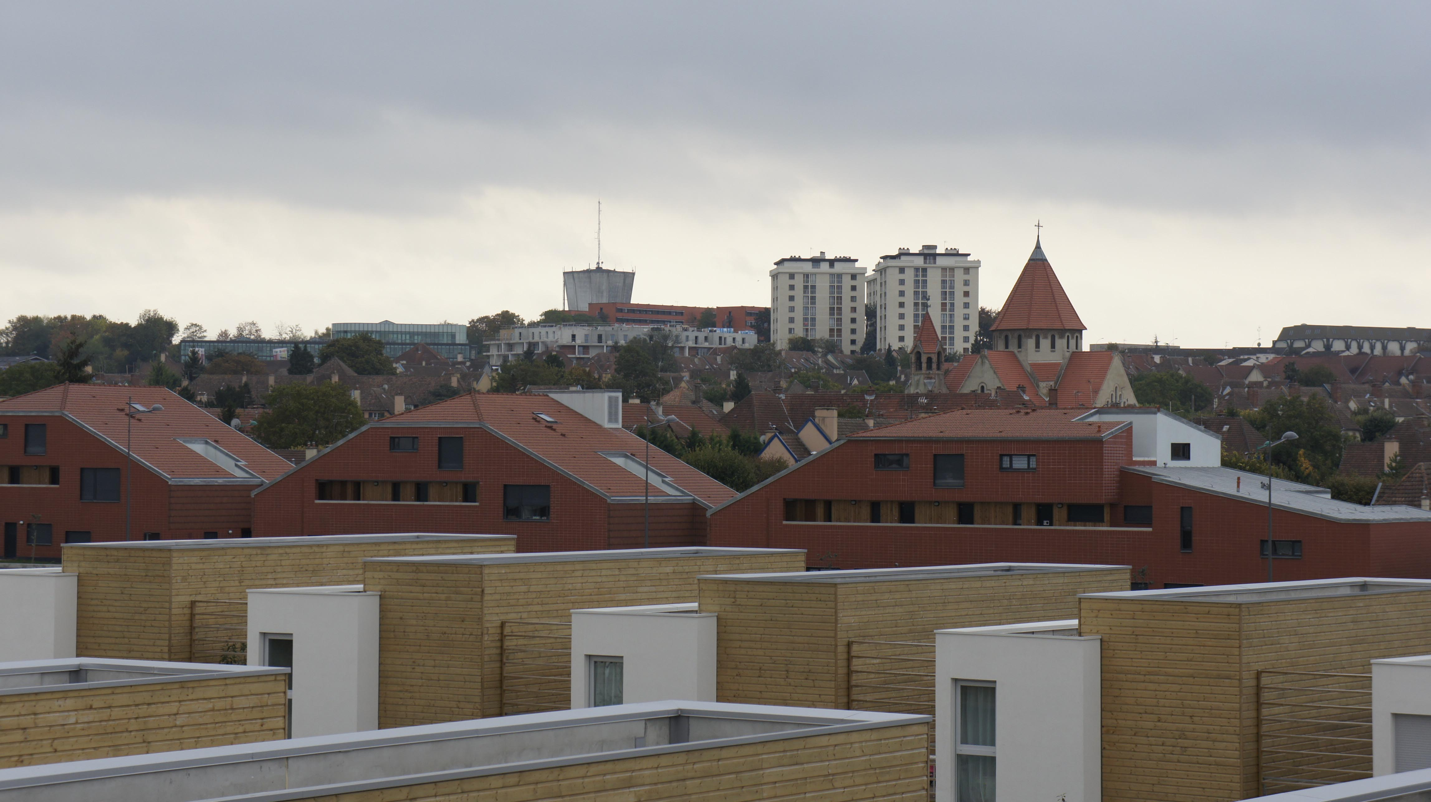 Vue du quartier Chemin vert et de l'église saint-Nicaise.